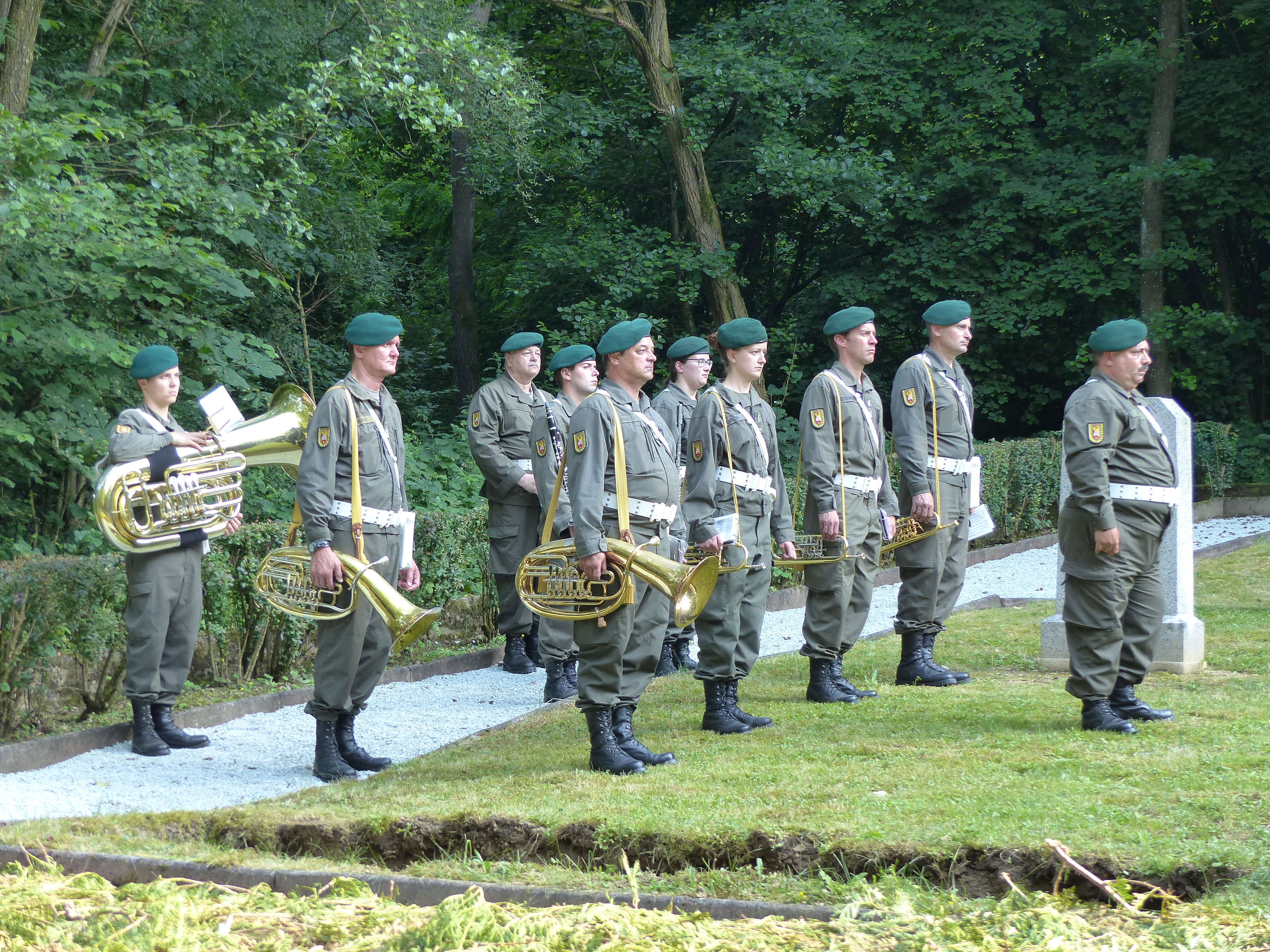 Begräbnis sowjetischer Soldaten 24. Juni 2016 - Abordnung der Militärmusik Burgenland unter der Leitung von Oberst Hans Miertl